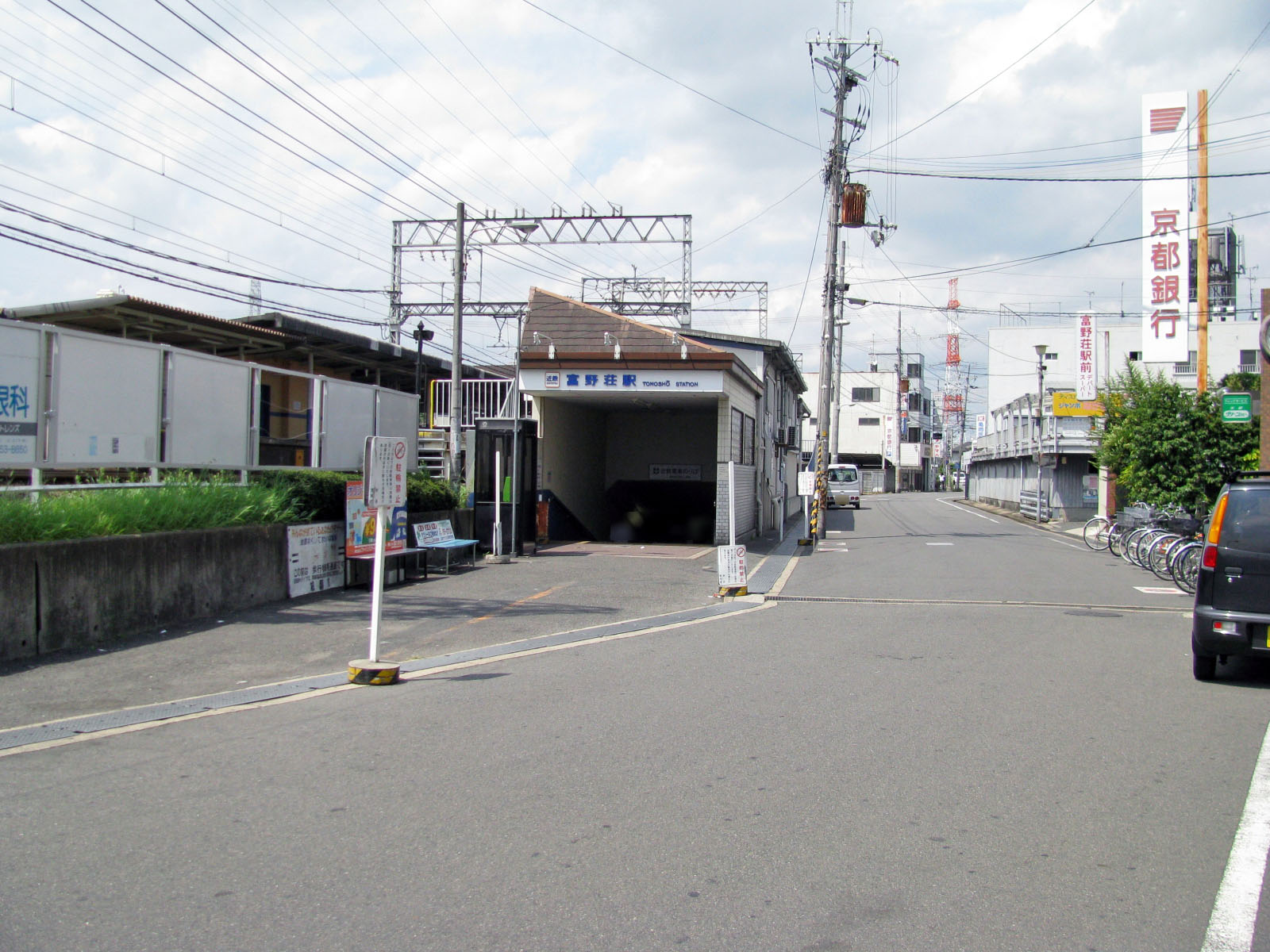 近鉄京都線富野荘駅